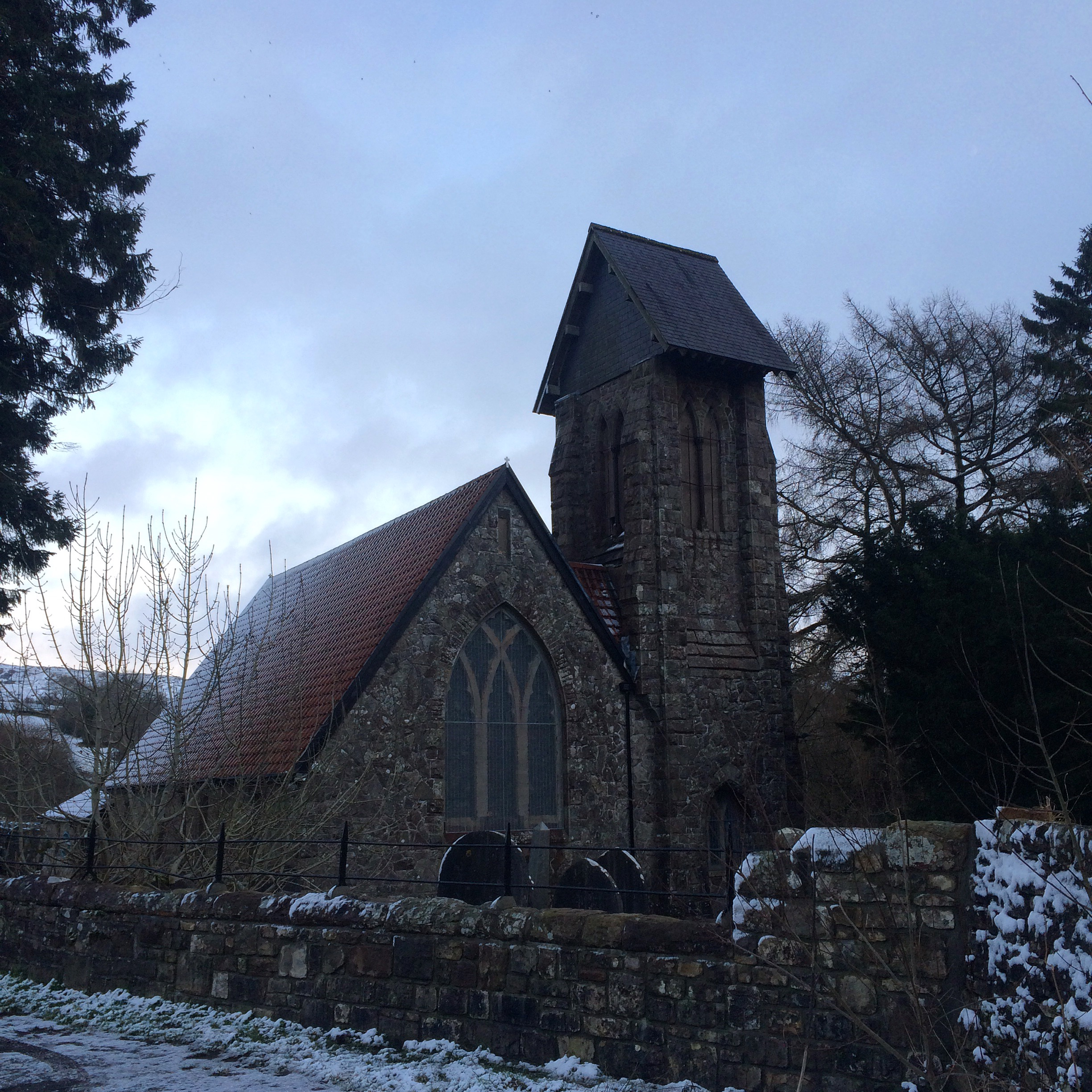 Eglwys Sant Gwynno, y Faenor, Merthyr Tudful